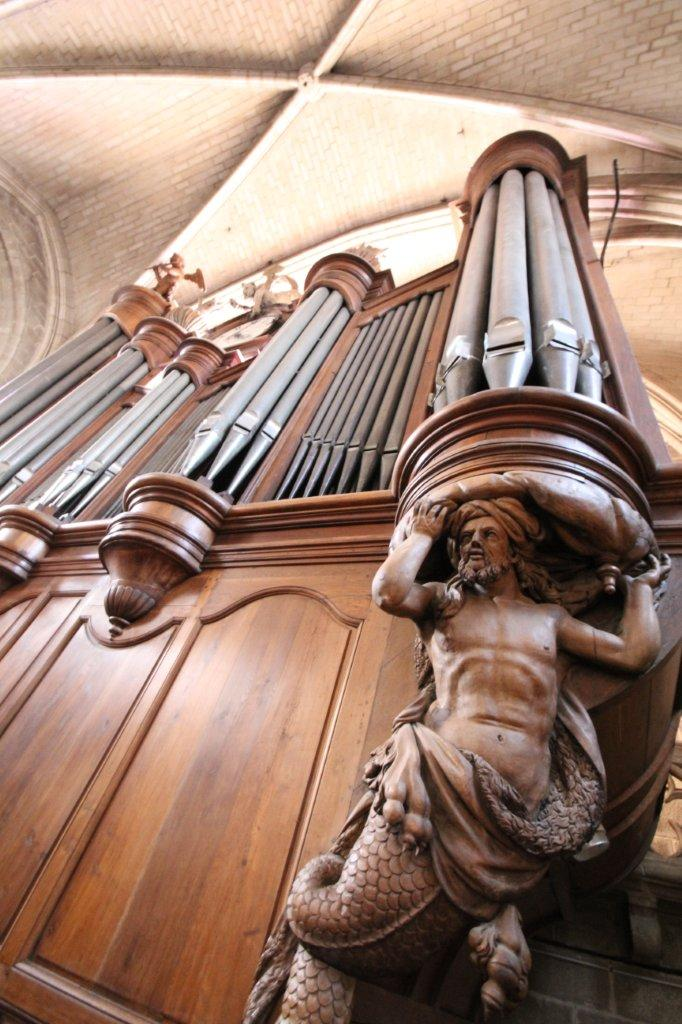 Cariatide soutenant le buffet d'orgue